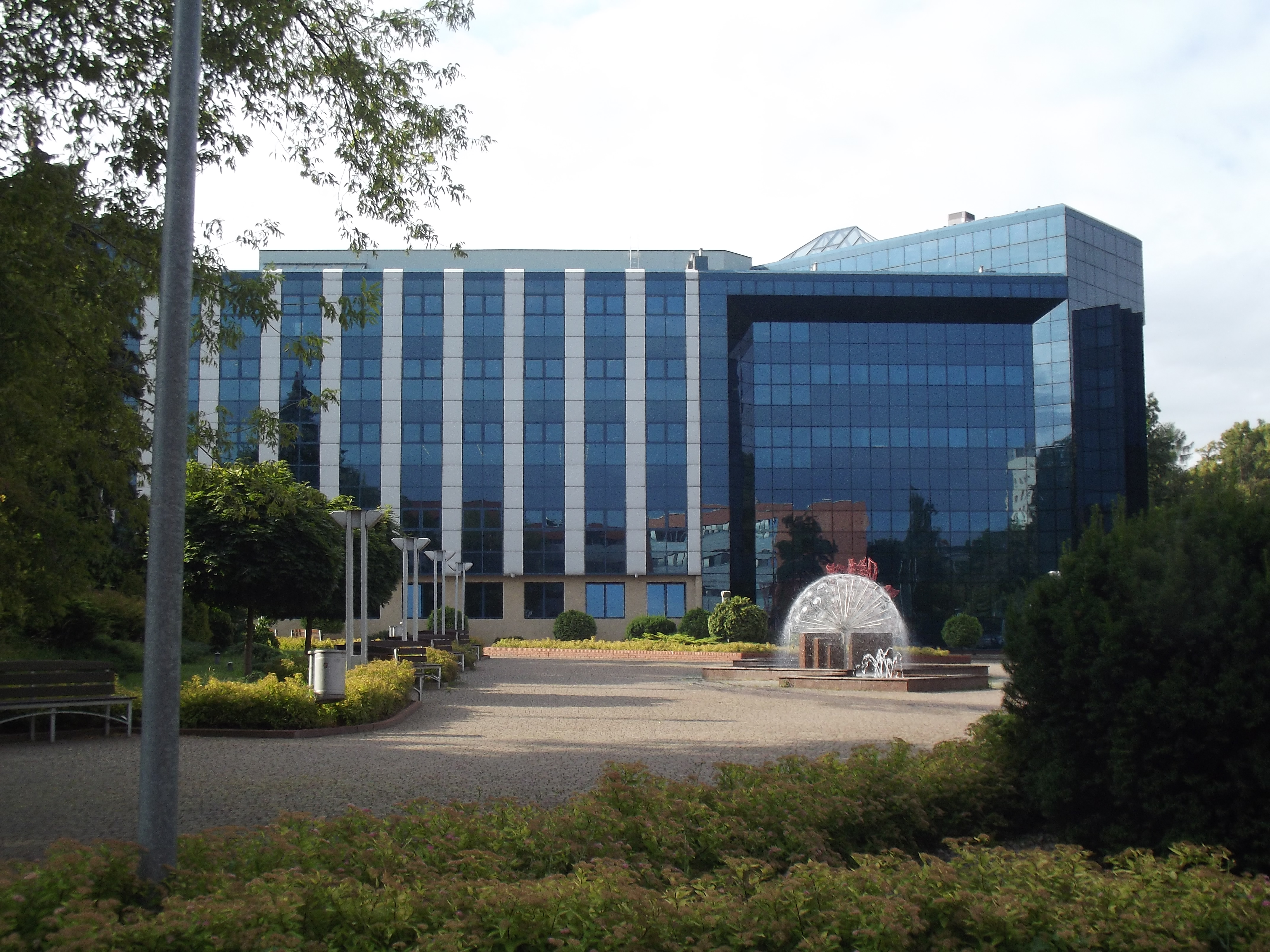 Biblioteka Uniwersytetu Łódzkiego BUŁa w Łodzi